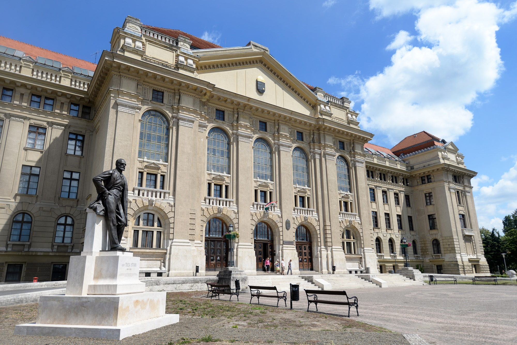 A Debreceni Egyetem Főépülete (Fotó: Bódi Sándor)